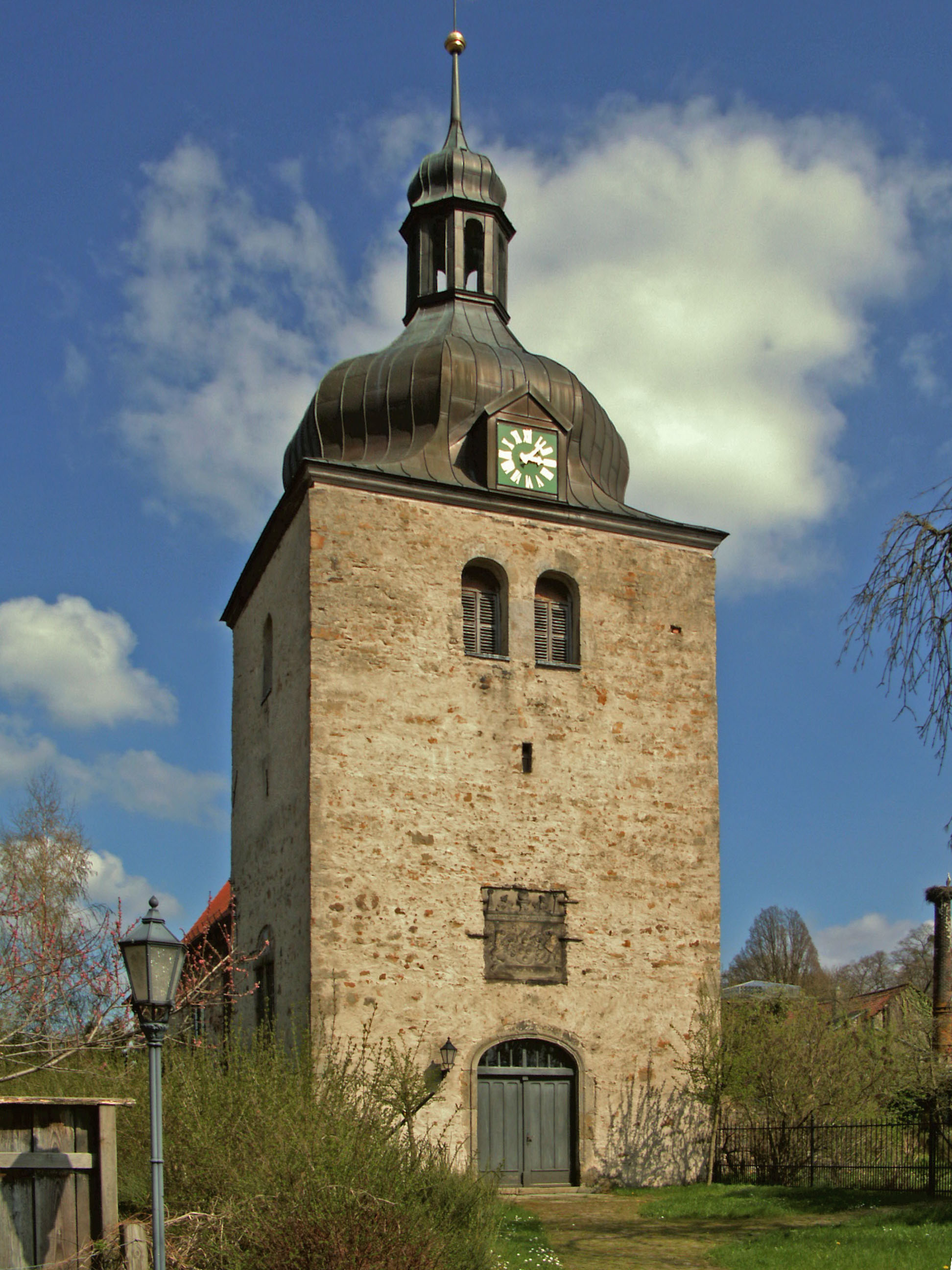 Evangelisch-lutherische Kirche in Seggerde (Sachsen-Anhalt)